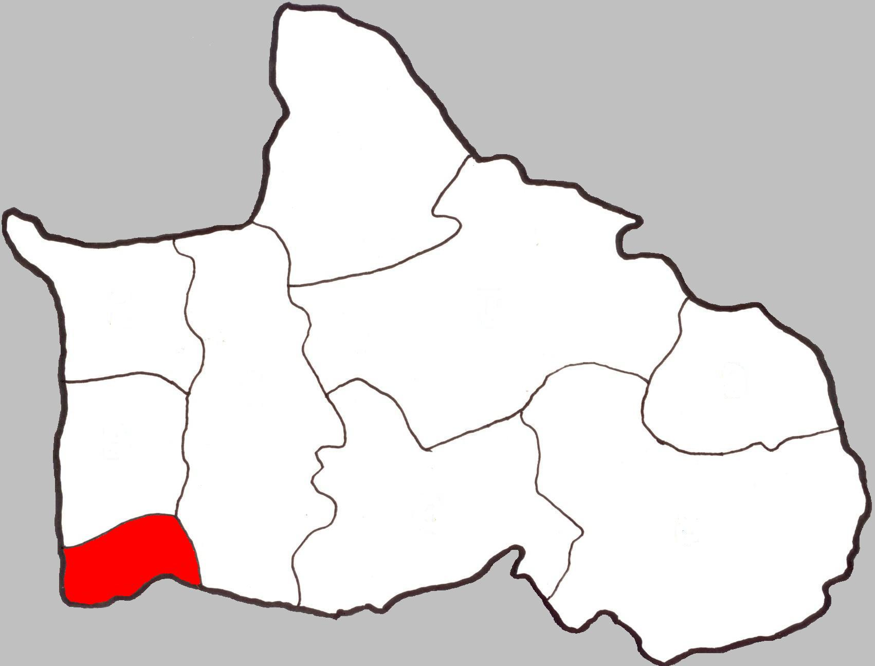 Map of Tambon Sanam Khli, Bang Krathum District, Phitsanulok, Thailand